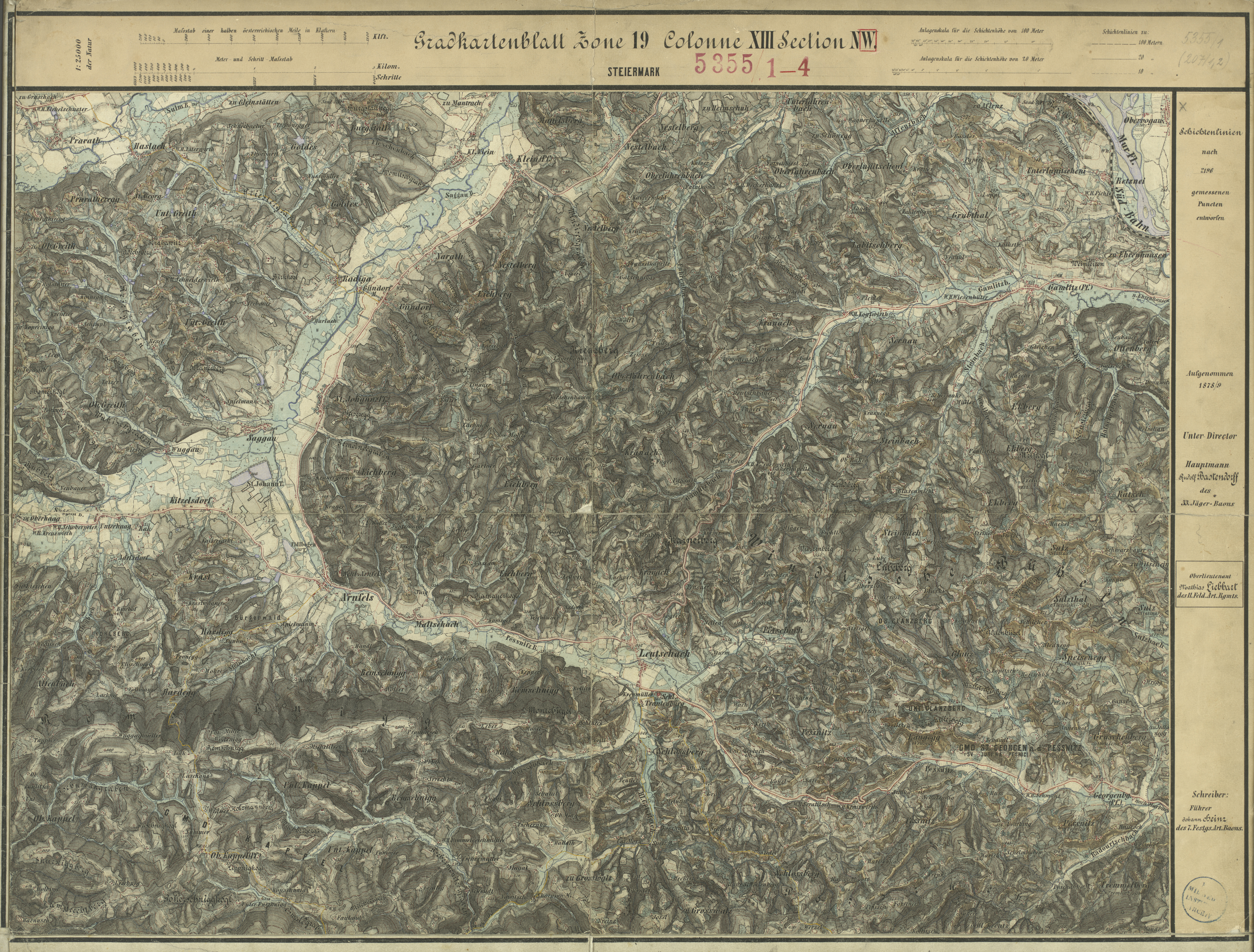 historische Landkarte: Gradkartenblatt Zone 19 Colonne XIII Section NW (später 5355/1). Gebiet von Arnfels, Leutschach, Gamlitz in der Südsteiermark. Franzisco-josephinische (3.) Landesaufnahme der österreichisch-ungarischen Monarchie. Aufnahmeblatt 1:25.000. Aufgenommen 1878/79.